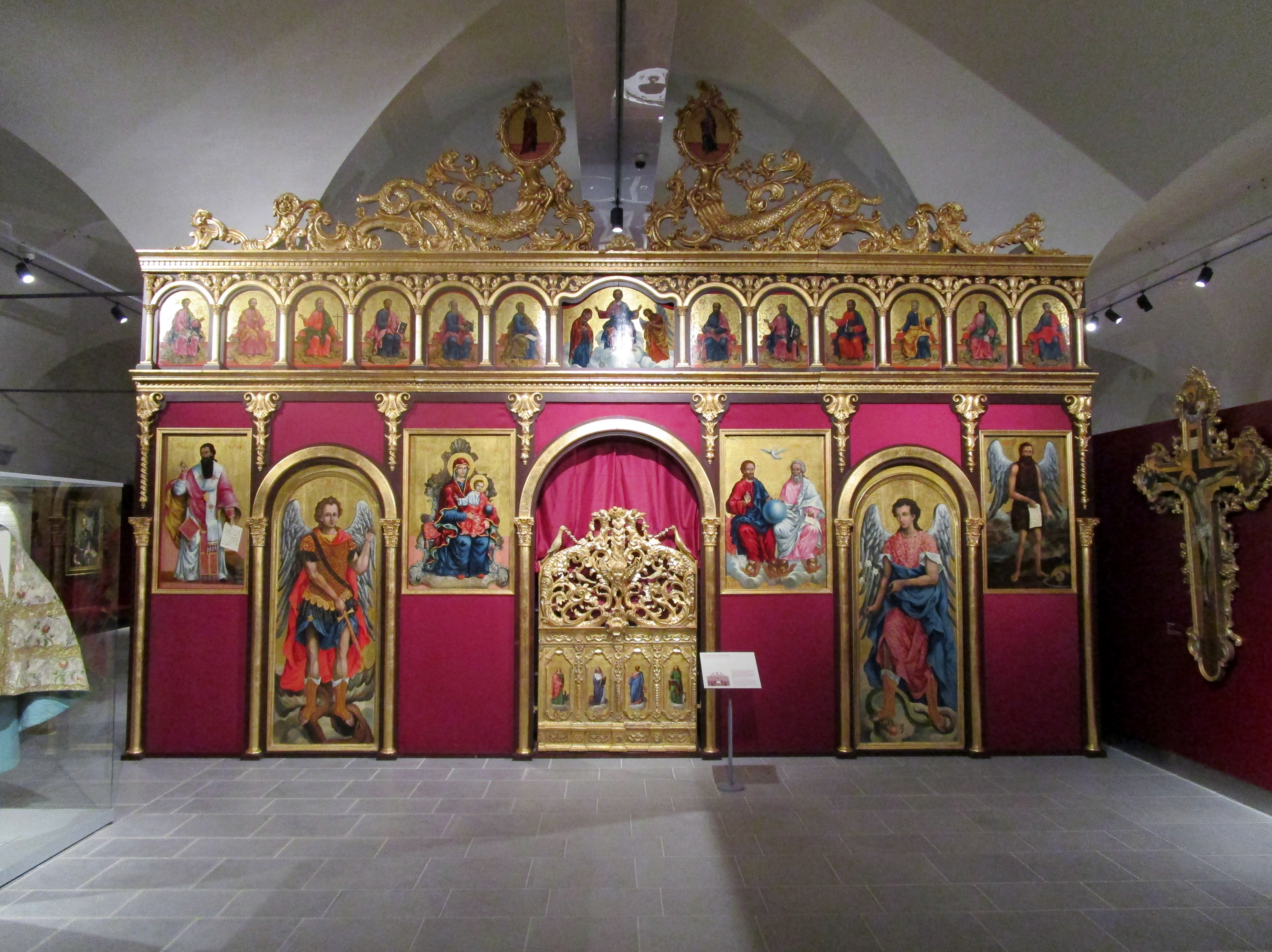 Livorno, museo della Città presso i Bottini dell'olio; iconostasi proveniente dalla demolita chiesa greco-ortodossa della Ss. Trinità.